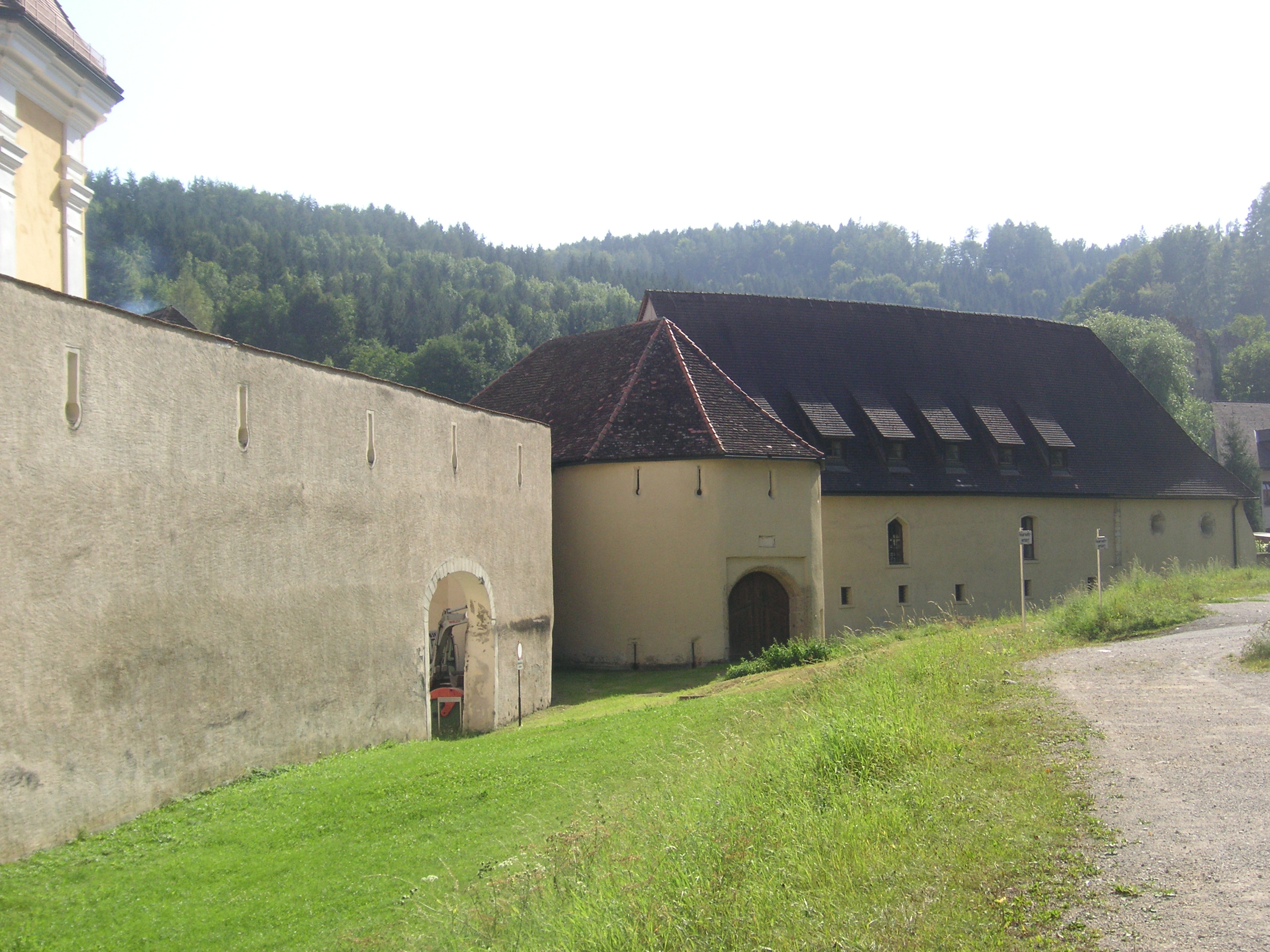 Gebäudefassaden an der nördlichen Aussenmauer des Stiftes Rein